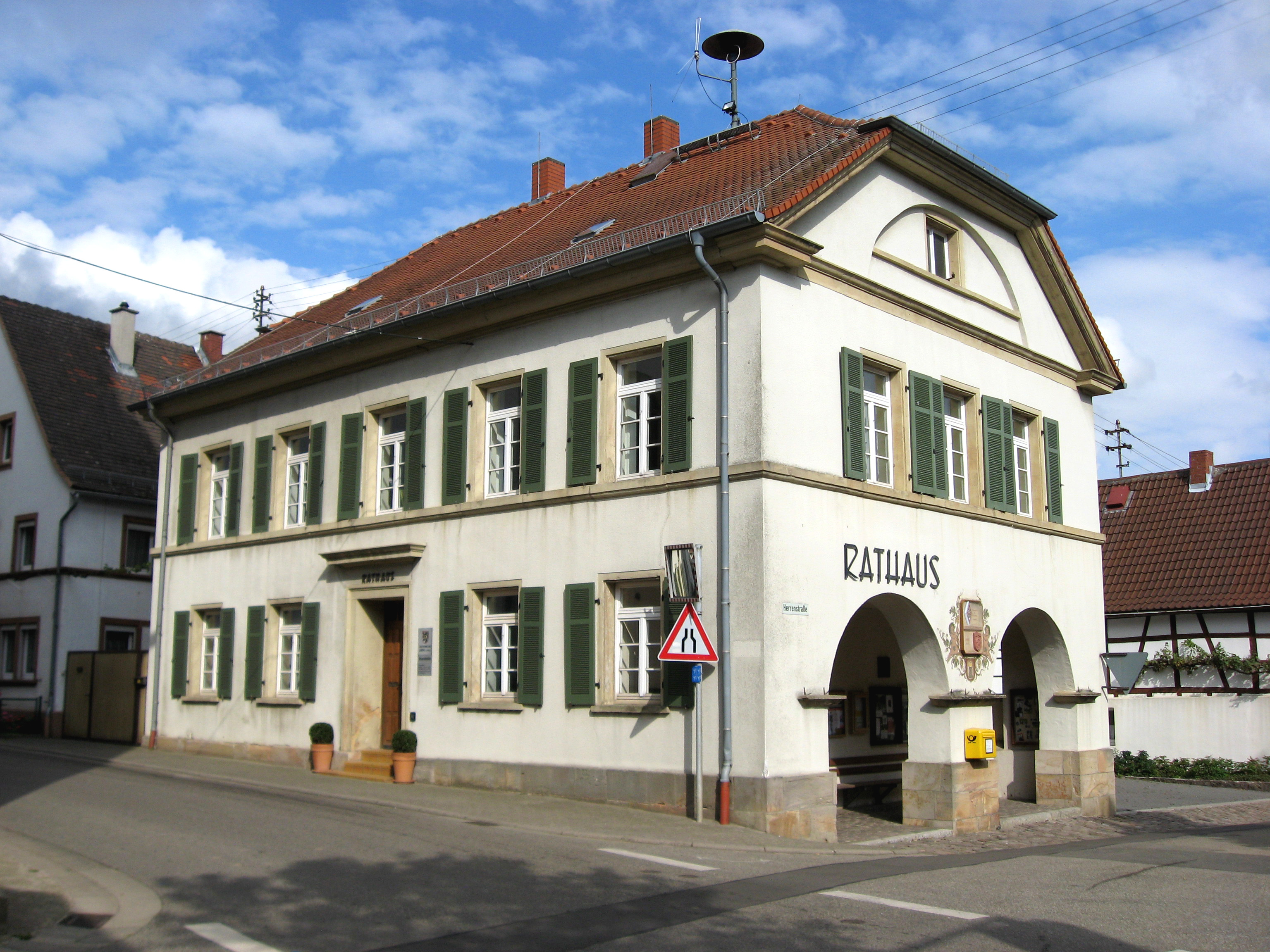 Rathaus Mörzheimer Hauptstraße 21 in Mörzheim; klassizistischer Krüppelwalmdachbau mit offener Erdgeschoss-Halle